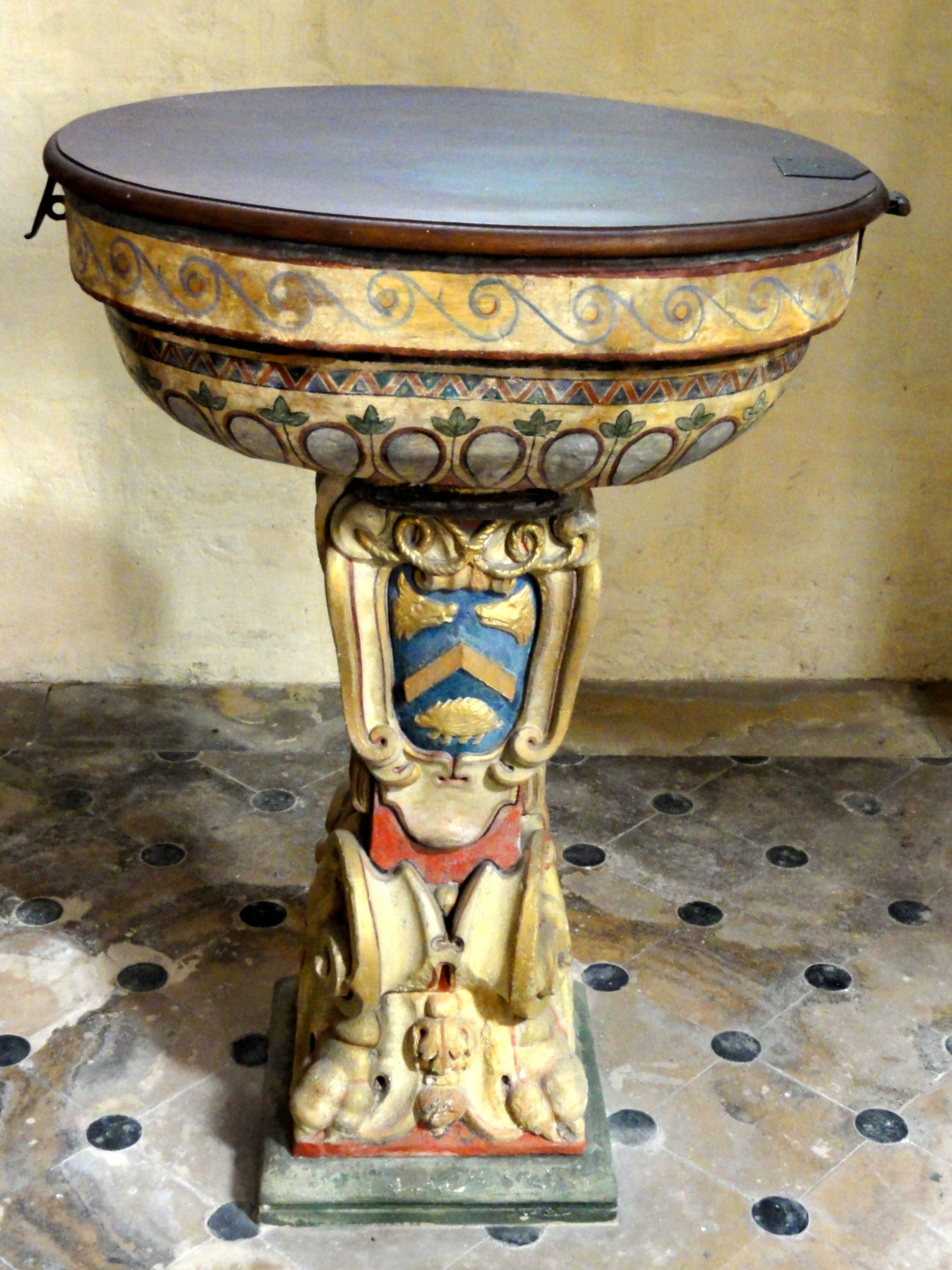 Fonts baptismaux (ancien bénitier).